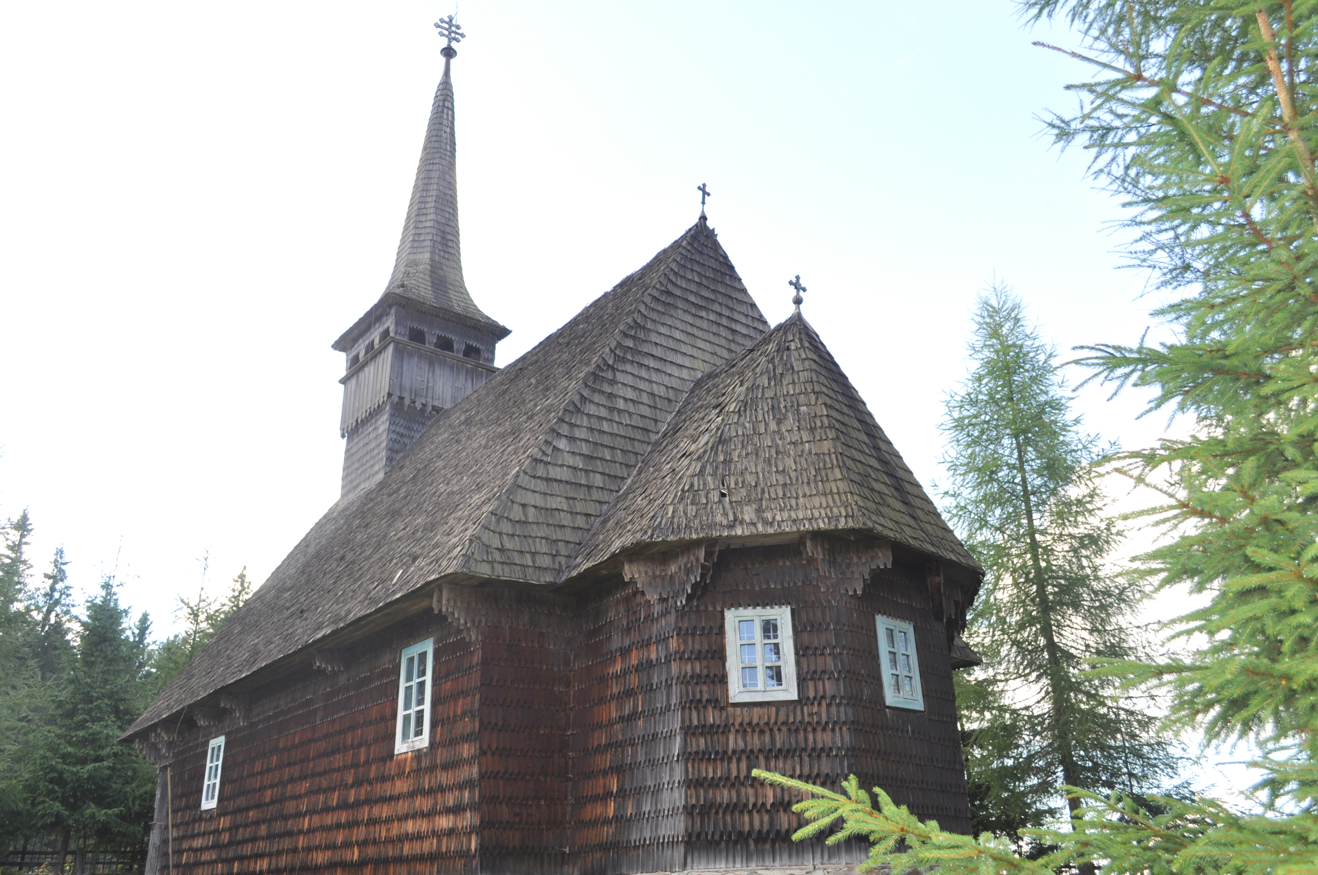 Biserica de lemn din Beliș, județul Cluj